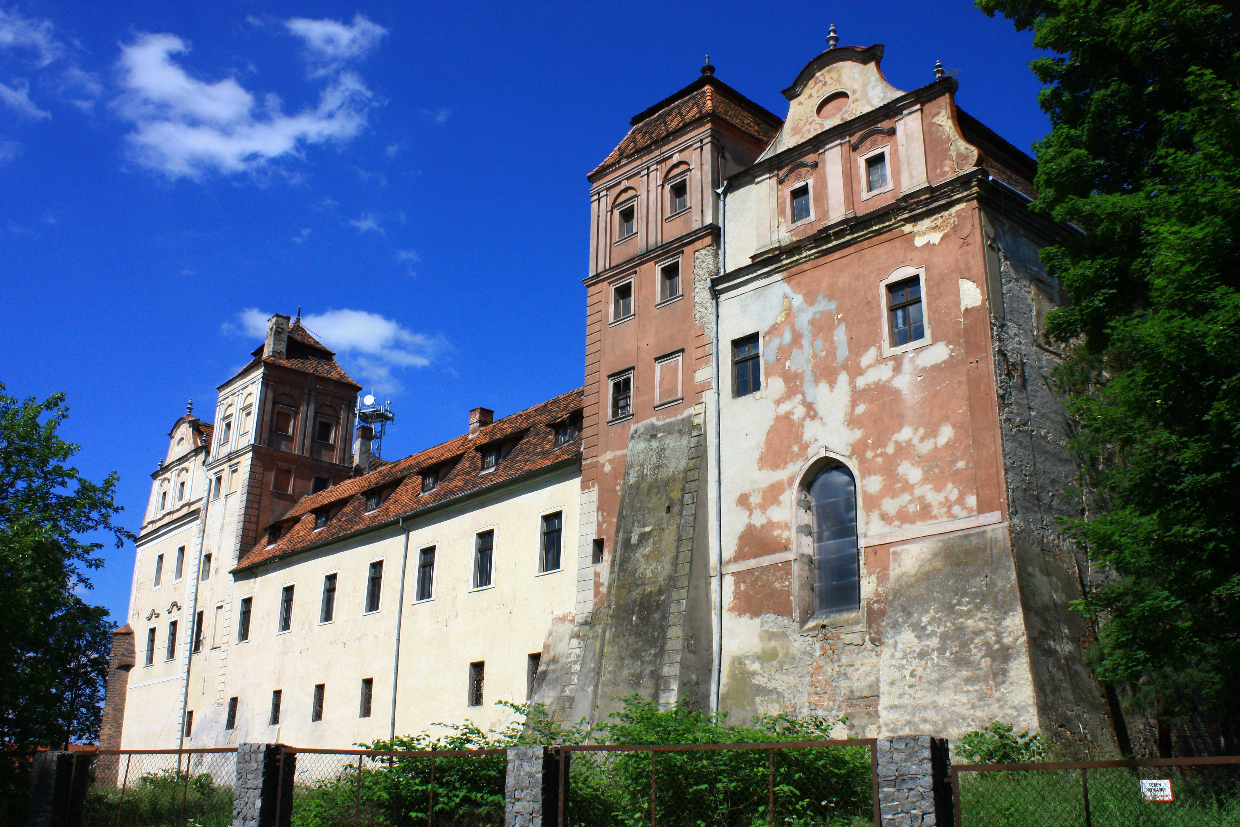 Niemodlin, zamek, XIV/XV, 1573-1577, 1740